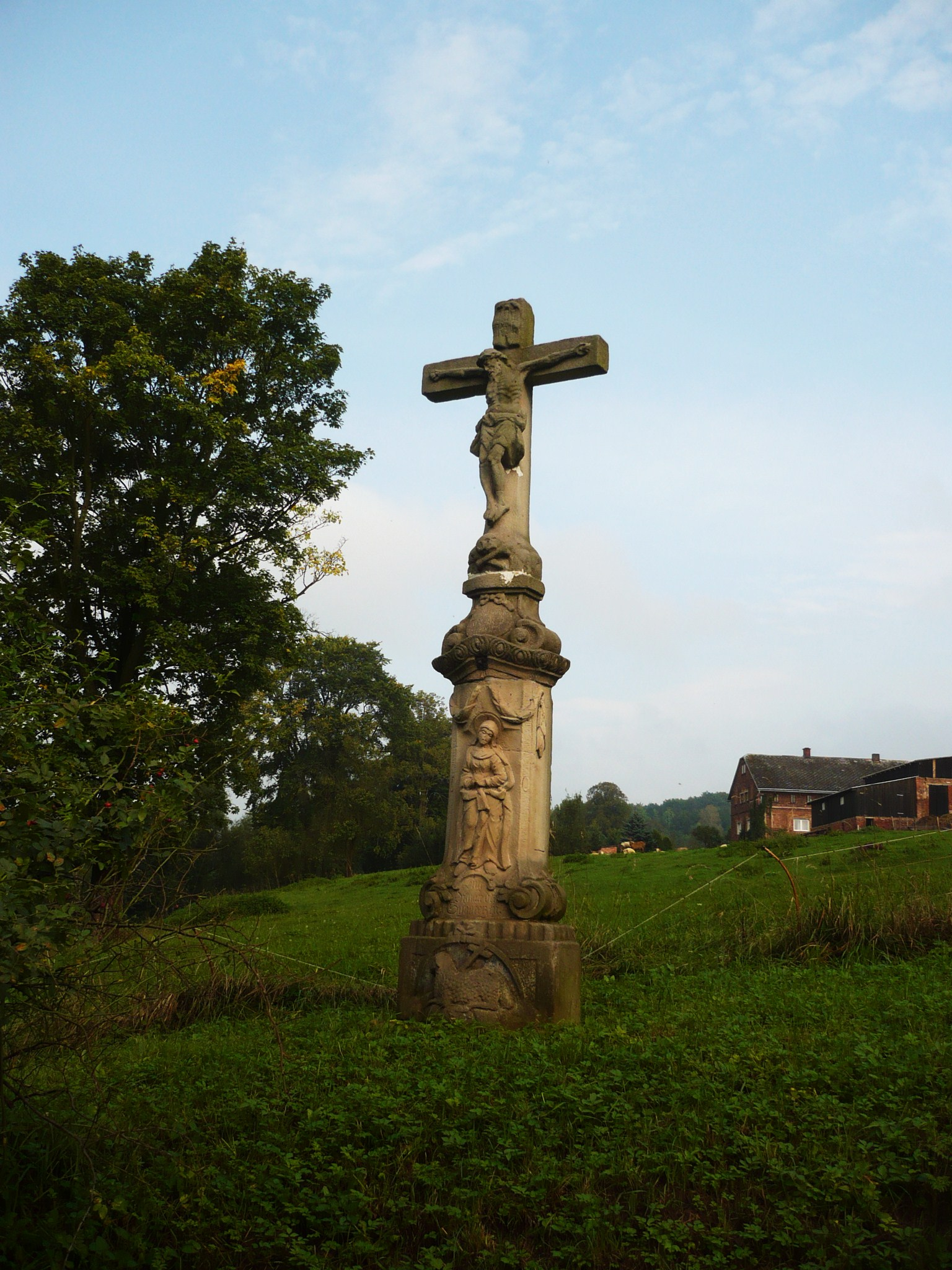 Sonov. Krzyż